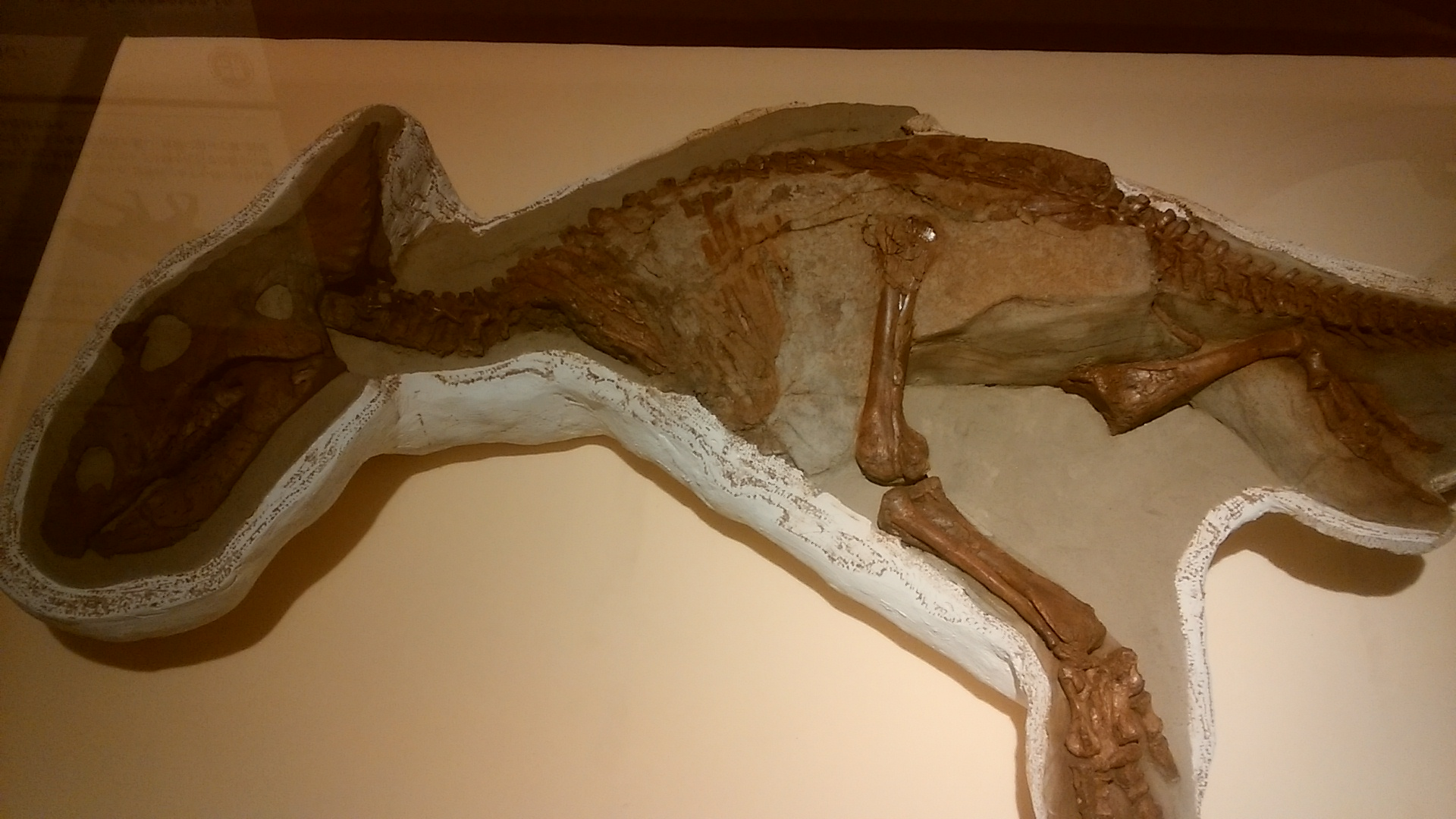 カスモサウルスのあかちゃん❤